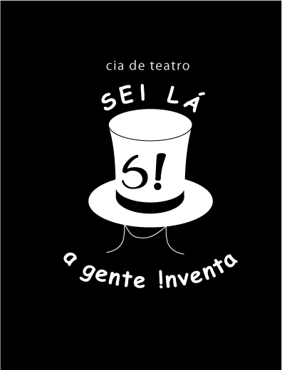 Logo oficial da cia Sei lá, a gente inventa!